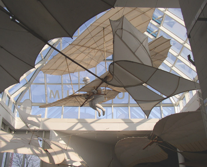 Blick in die Ausstellungshalle des Museums, Foto: Wittig